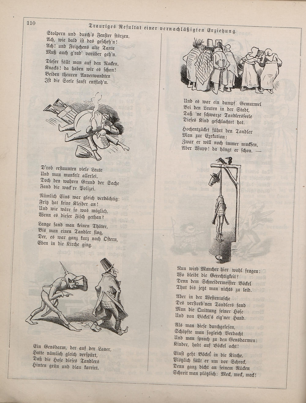 Fliegende Blätter, Band 33, Seite 110